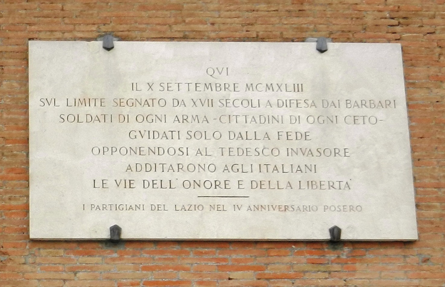 Lapide commemorativa dei caduti di Porta San Paolo (10 settembre 1943)